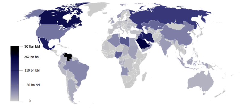 Mapa actualizado con las reservas probadas de petroleo en el mundo.